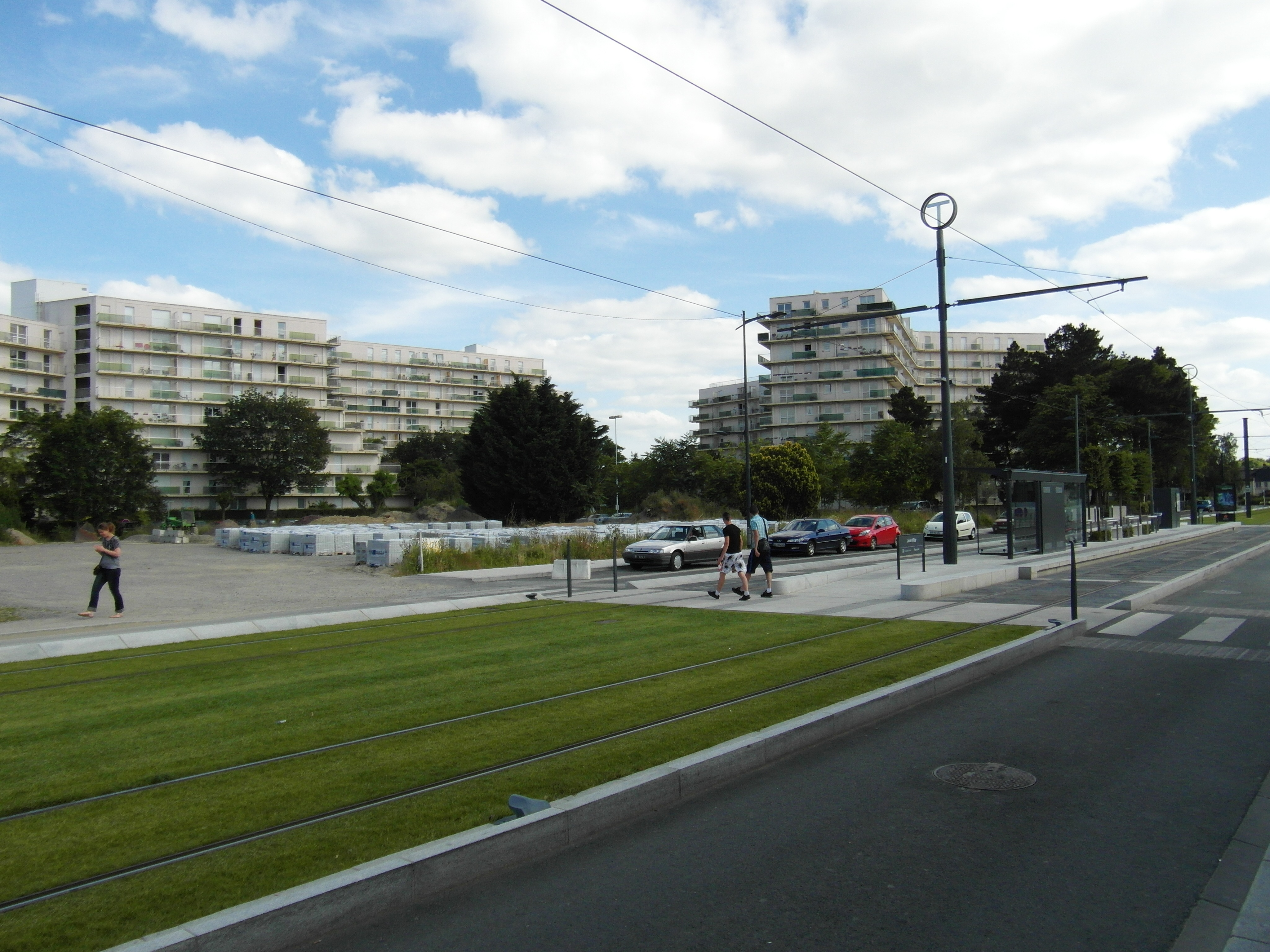 Streckenast in den Süden der Stadt - Großsiedlungsstrukturen